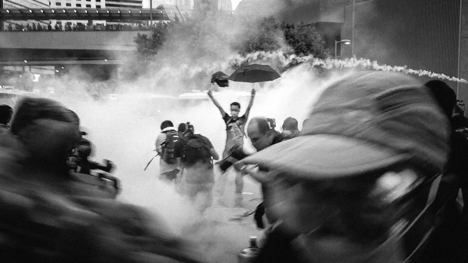 香港警察中國公安化